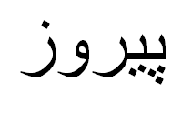 Пируз